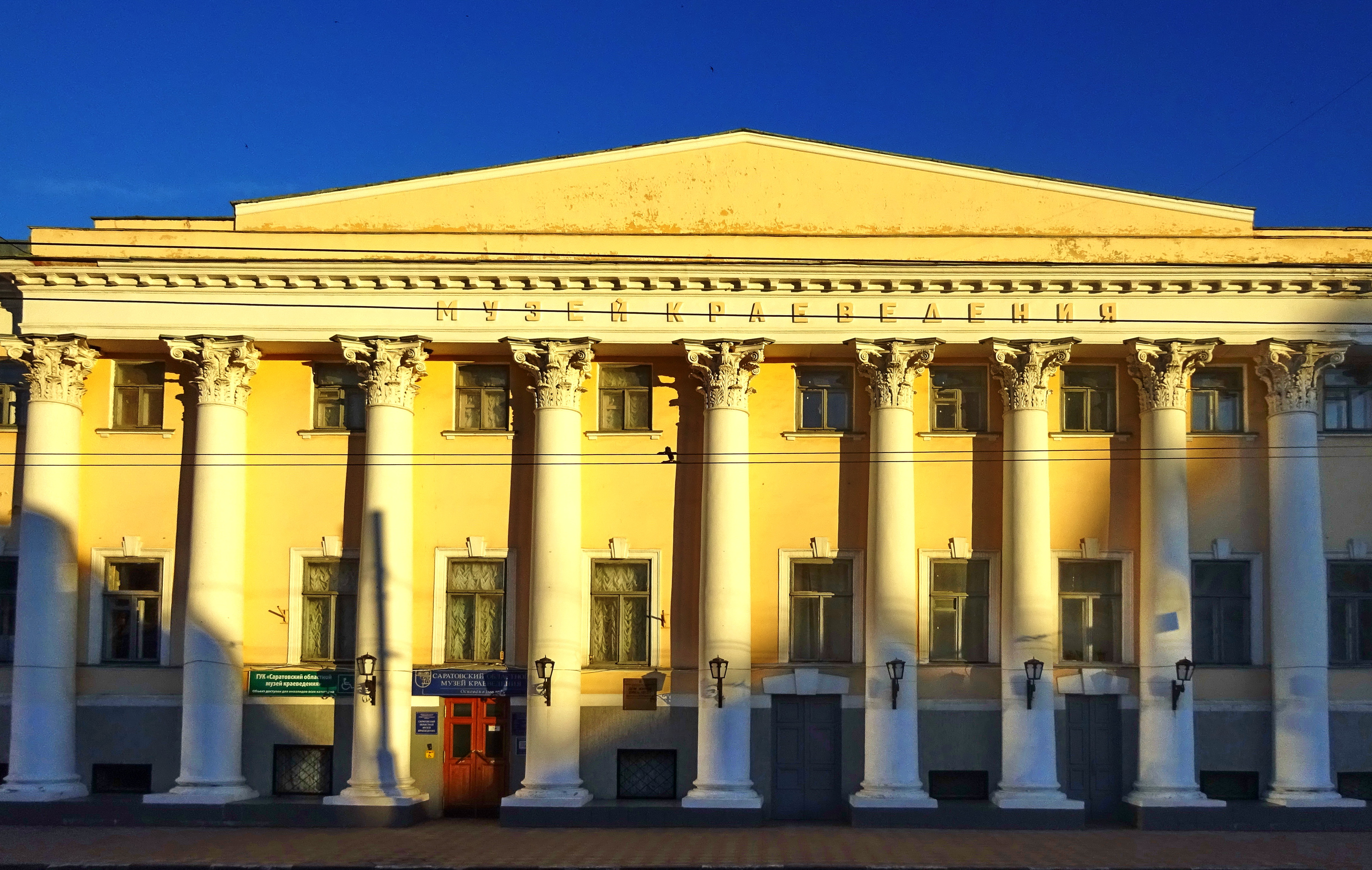 Усадьба Устинова М.А. (здание Духовной семинарии): улица Лермонтова, 34 (Старо-Соборная площадь), Саратов, Саратовская область. Ныне Саратовский областной музей краеведения. Музейная площадь.